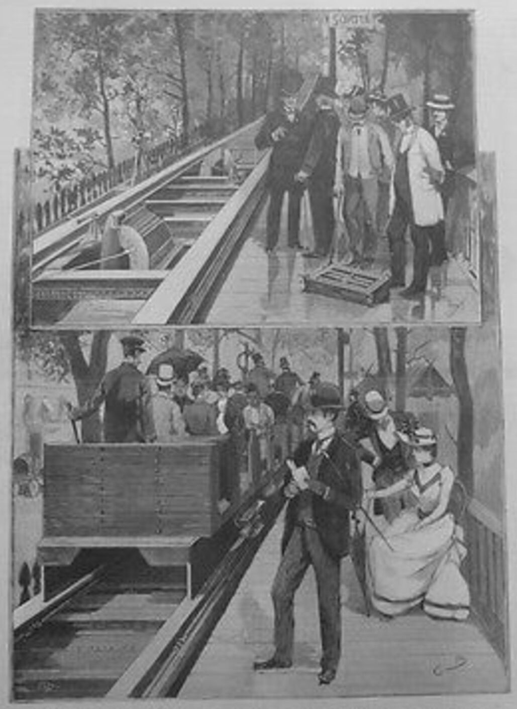 Le Monde Illustre - Le Chemin de Fer Glisant